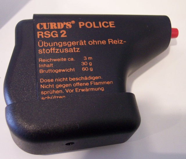 Reizgassprühgerät